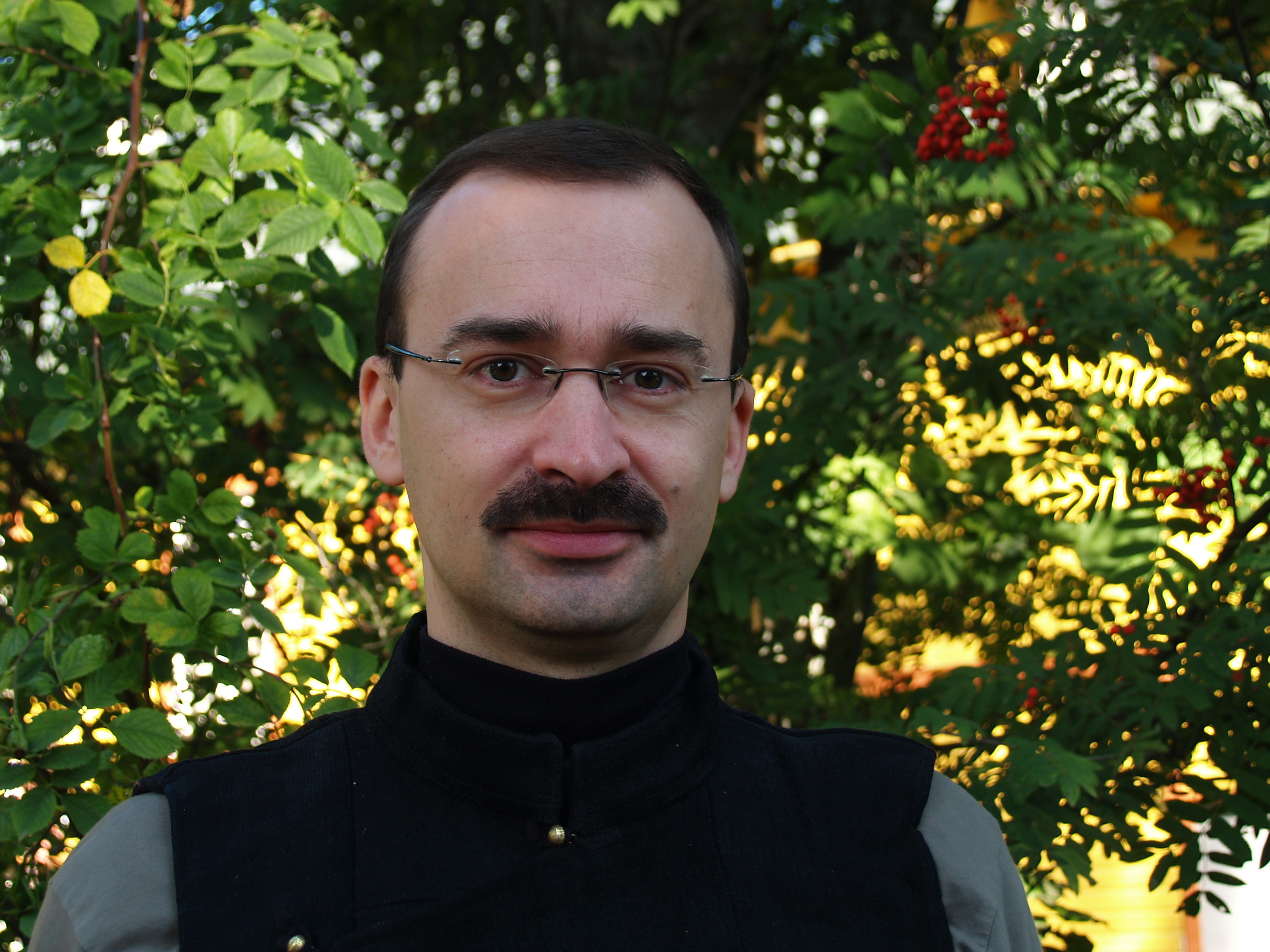 Laur Järv teadus.ee suvekoolis Käsmus.